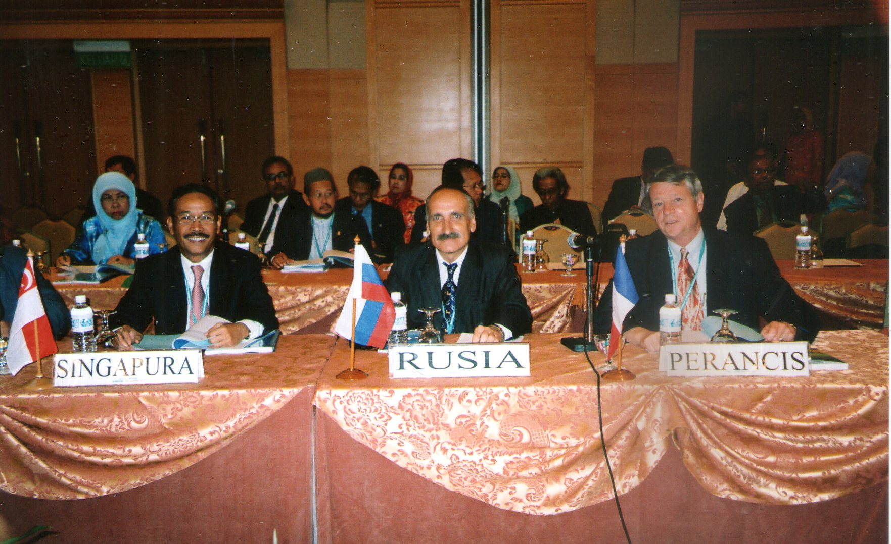 Sidang MABM tahun 2004